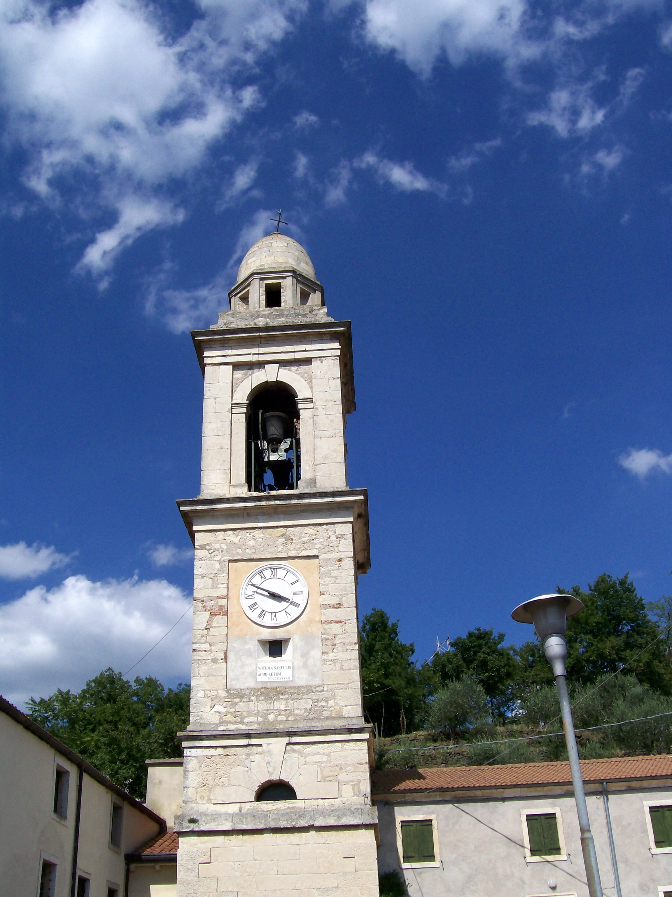 Campanile della chiesa parrocchiale di S. Maria Maddalena in Castelcerino di Soave (VR)